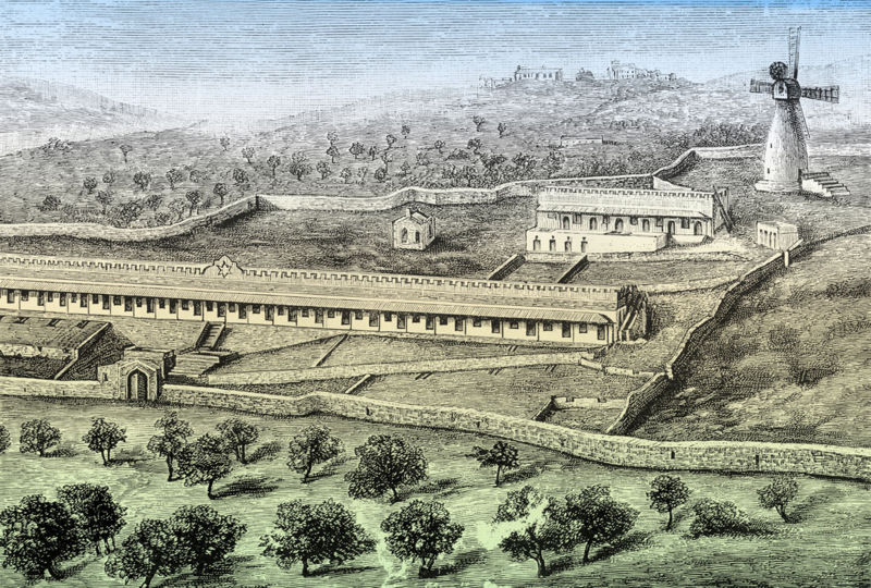 משכנות שאננים made by maning 1880